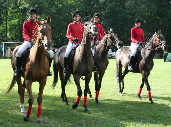 Milicz - pokaz konny